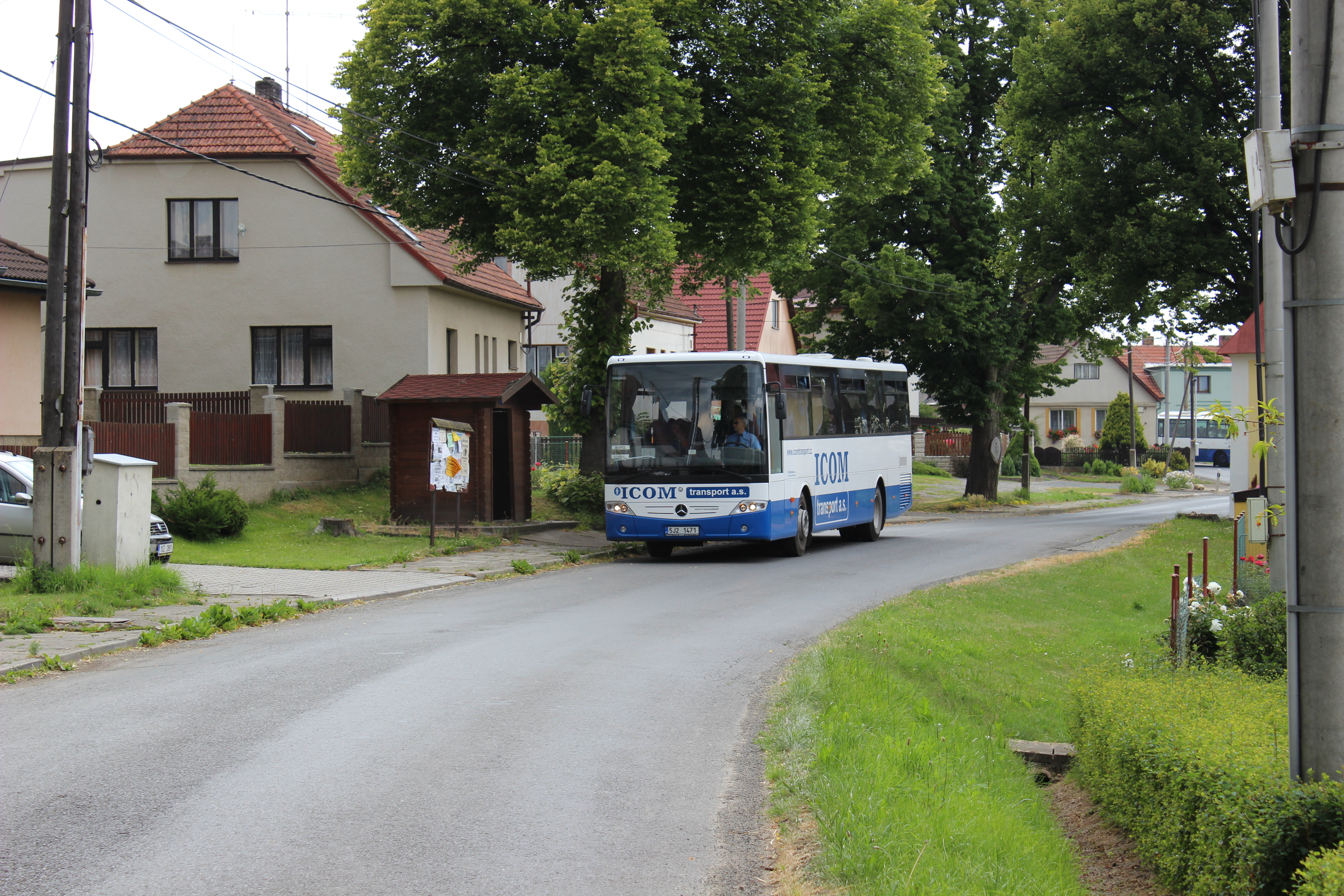 Linkový autobus v otročické zastávce.